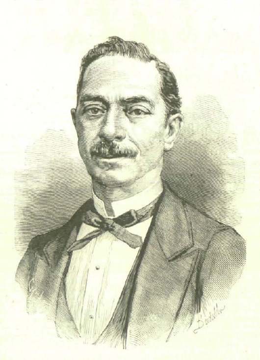 Imagen de Raimundo de Miguel